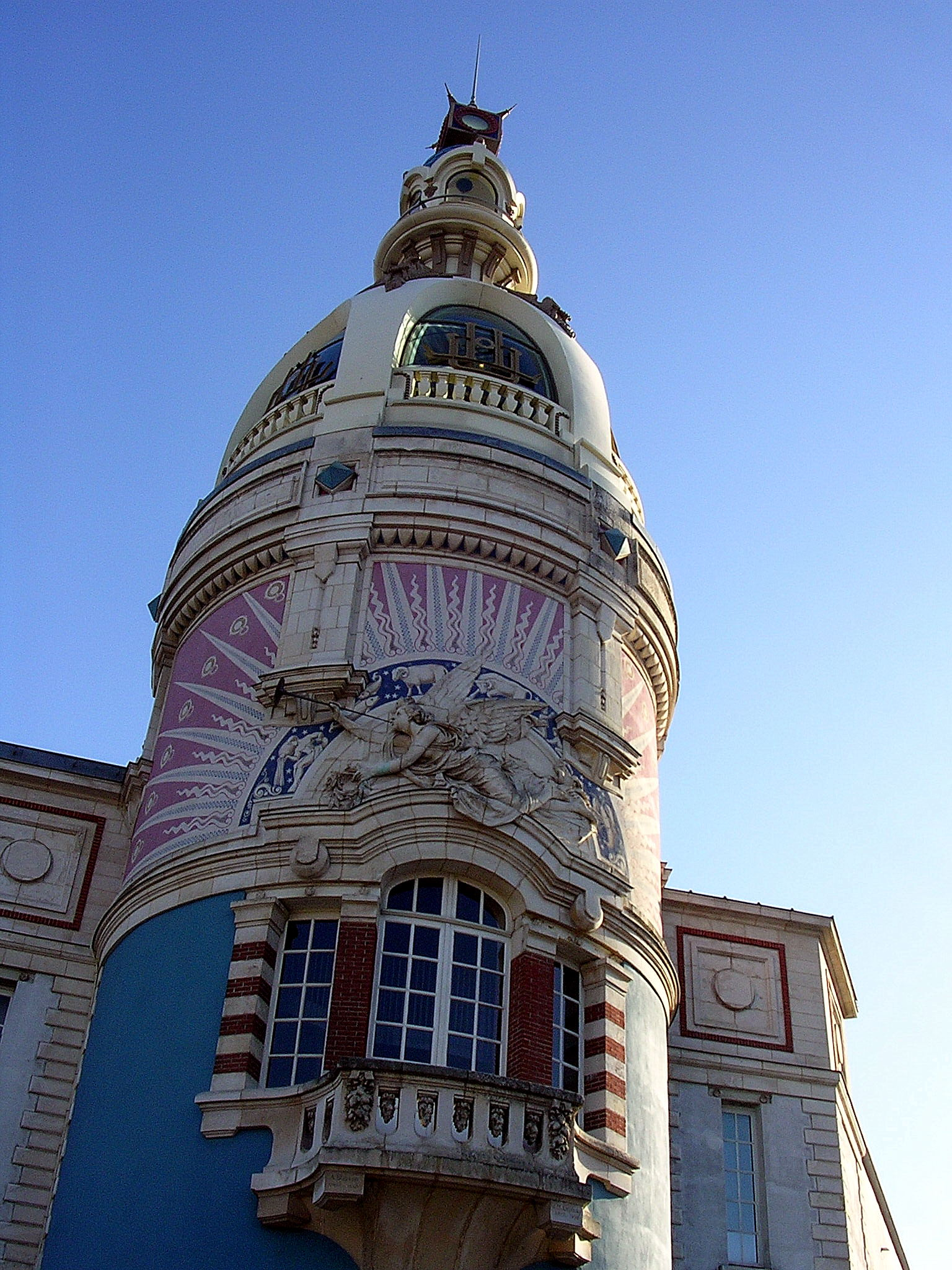 Tour LU à Nantes, France. Photo prise par Jibi44